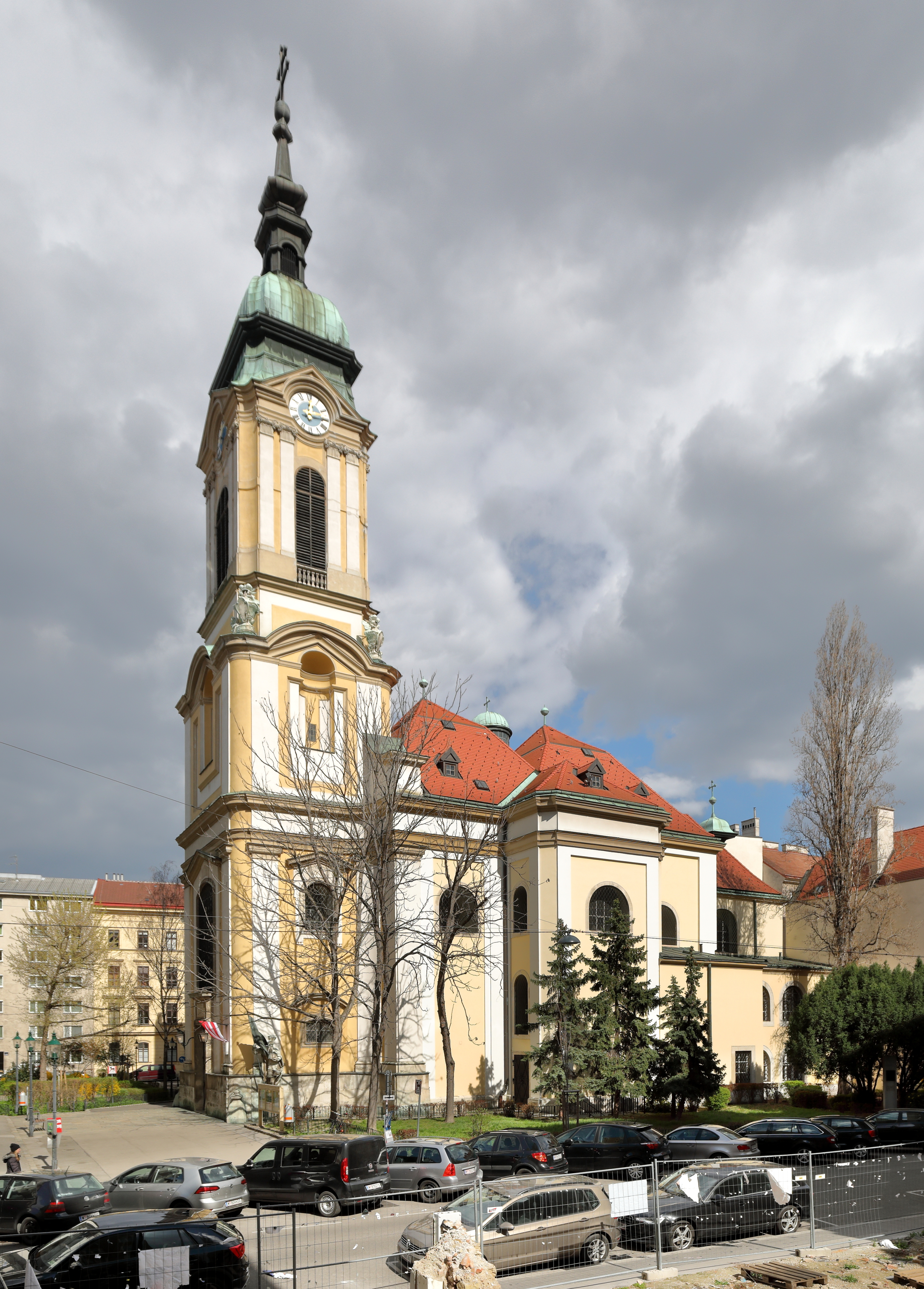 Südwestansicht der Leopoldskirche am Alexander-Poch-Platz im 2. Wiener Gemeindebezirk Leopoldstadt.Die Kirche wurde an Stelle einer 1671 errichteten Vorgängerkirche von 1722 bis 1724 nach Plänen von Anton Ospel errichtet und 1779 geweiht. Am 12. März 1945 wurde die Kirche durch Bomben schwerstens beschädigt. Der Wiederaufbau (1946–1948) erfolgte unter der Leitung der Architektin Helene (Hella) Koller-Buchwieser. Endgültig war dieser Wiederaufbau (Wiederinstandsetzung) erst durch die Außenrenovierung (1959–1961) abgeschlossen, die wiederum Frau Koller-Buchwieser leitete.